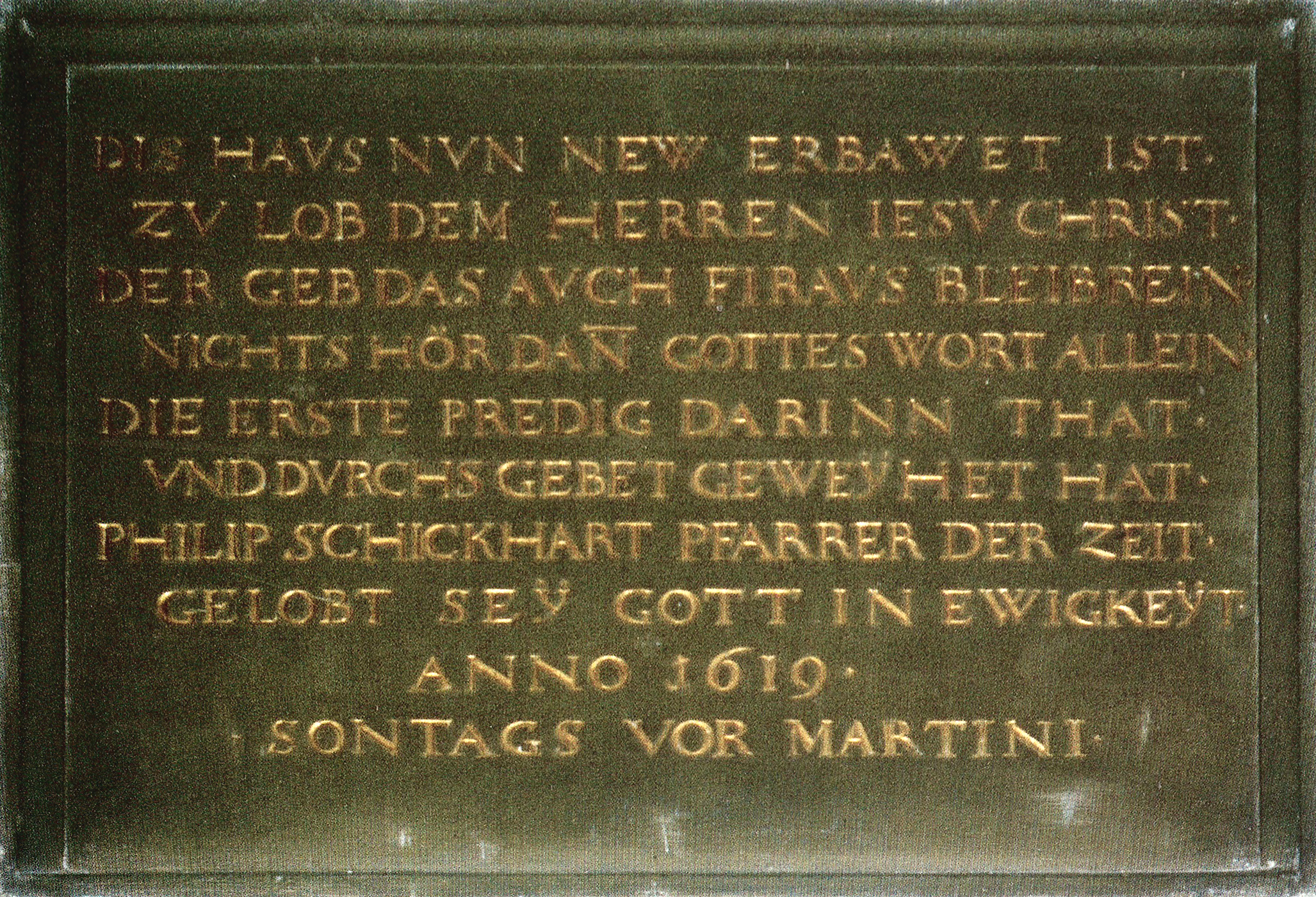 Gedenktafel zur Einweihung der Stadtkirche in Göppingen mit der Erwähnung Philipp Schickharts